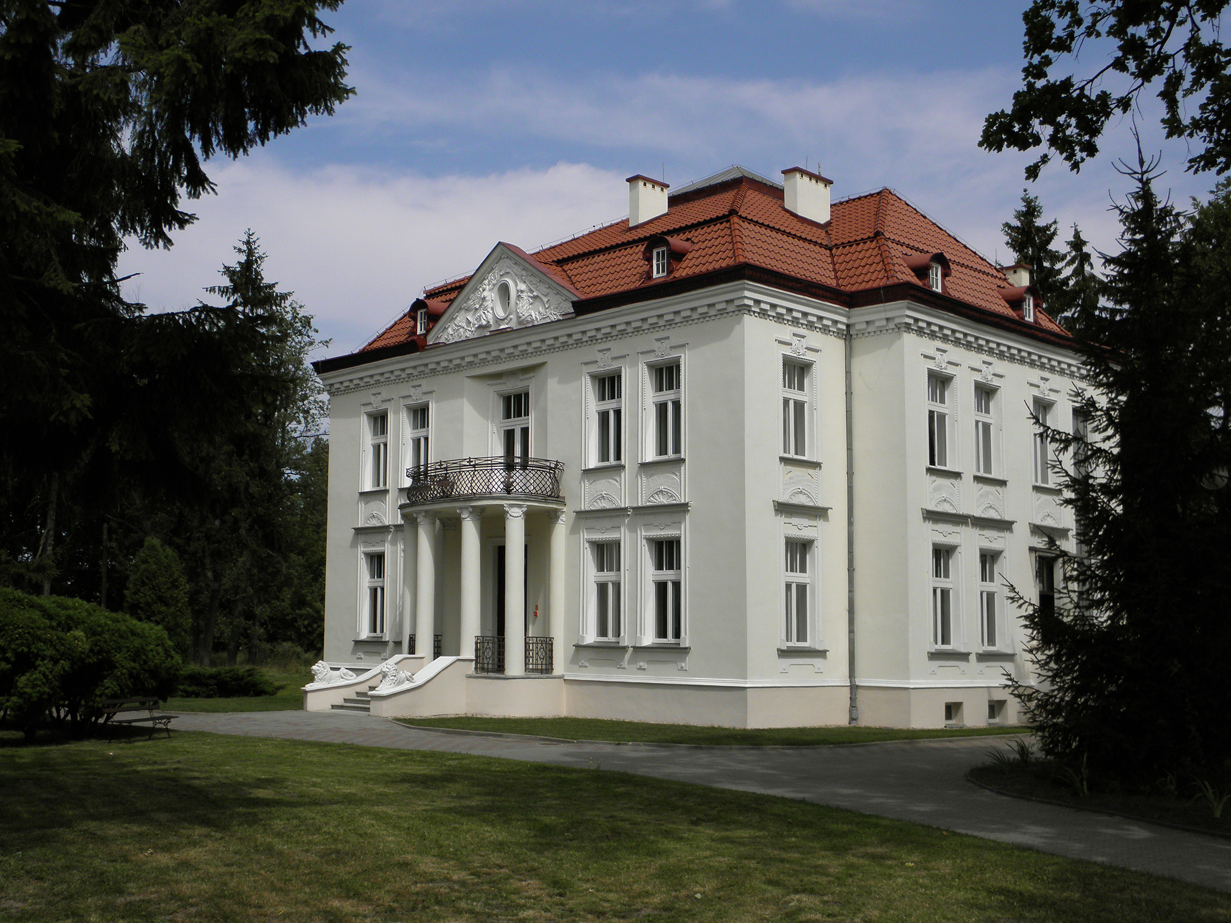 Wsola - pałac Gombrowicza.